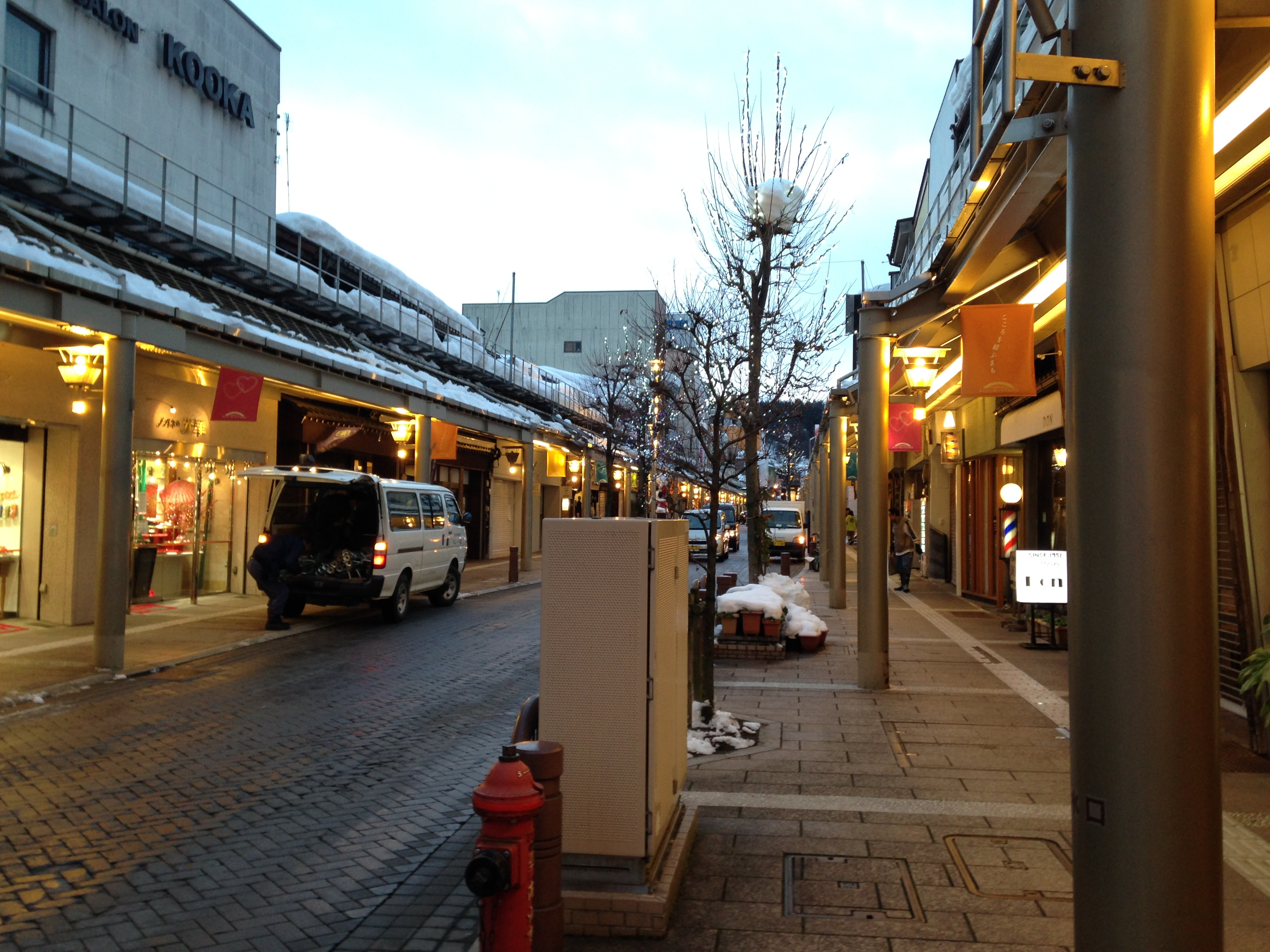 高山本町通り商店街